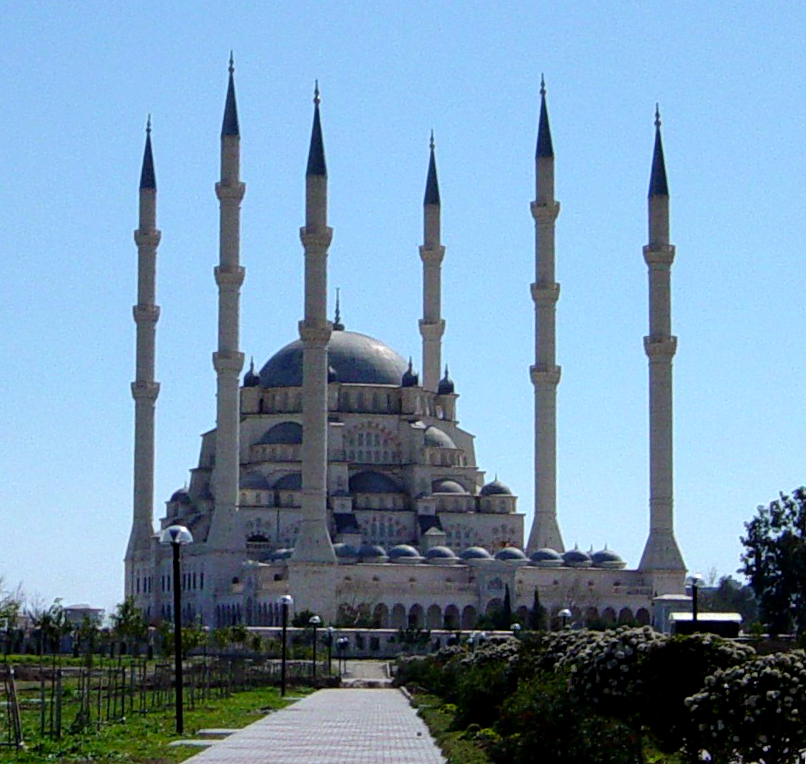 Sabanci Merkez Moschee in Adana